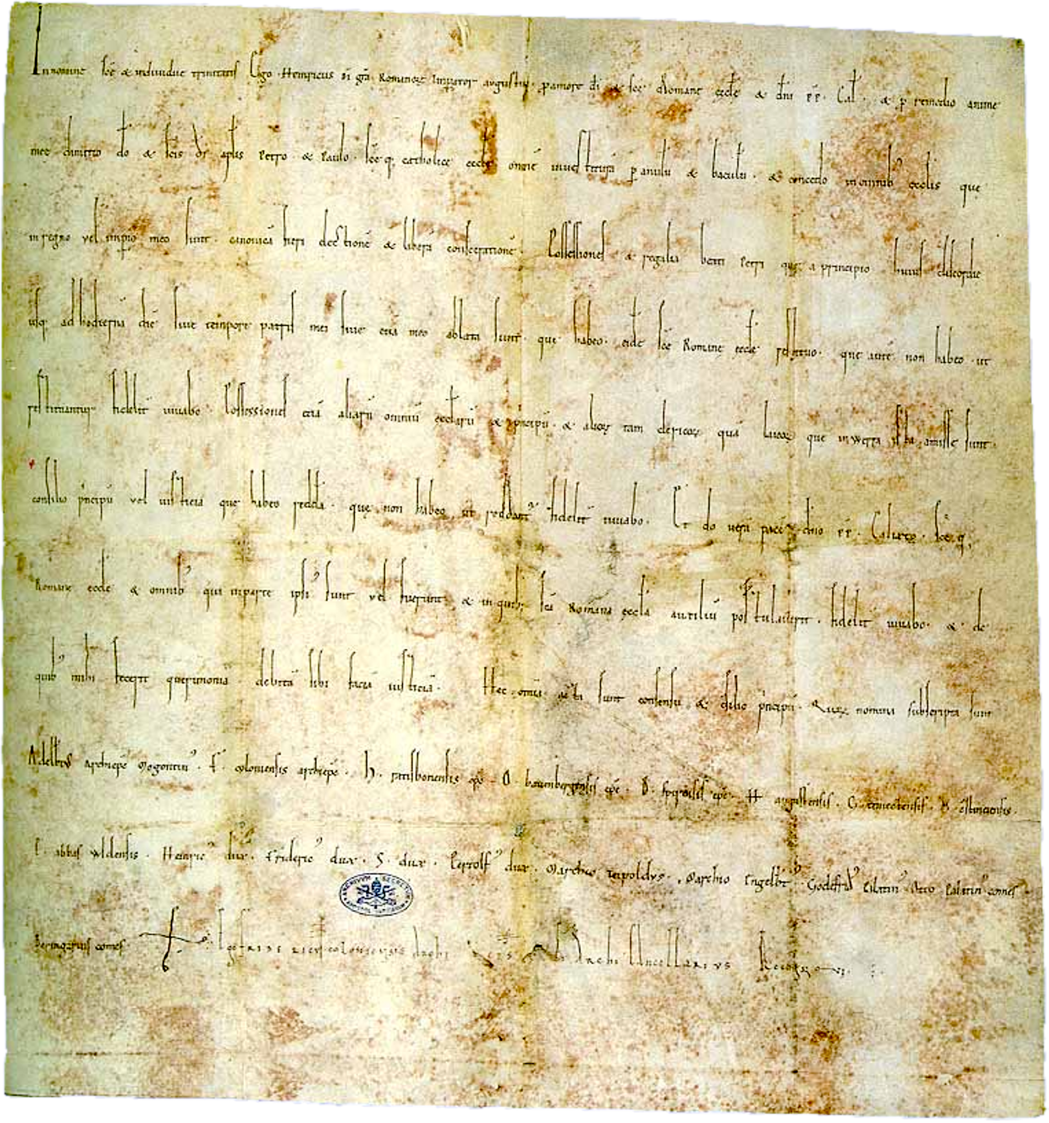 Das Wormser Konkordat, Vertrag zwischen dem deutschen Kaiser Heinrich V. und Papst Calixt II. zur Beilegung des Investiturstreits: In nomine sanctae et individuae Trinitatis. Ego Heinricus, Dei gratia Romanorum imperator augustus, pro amore Dei et Sanctae Romanae Ecclesiae et domini papae Calixti et pro remedio animae meae dimitto Deo et sanctis Dei apostolis Petro et Paulo Sanctaeque Catholicae Ecclesiae omnem investituram per anulum et baculum et concedo in omnibus ecclesiis, quae in regno vel imperio meo sunt, canonicam fieri electionem ac liberam consecrationem. Possessiones et regalia beati Petri, quae a principio huius discordiae usque ad hodiernam diem, sive tempore patris mei sive etiam meo, ablata sunt, quae habeo, eidem Sanctae Romanae Ecclesiae restituo; quae autem non habeo, ut restituantur fideliter iuvabo. Possessiones etiam aliarum omnium ecclesiarum et principum et aliorum tam clericorum quam laicorum, quae in werra ista amissae sunt, consilio principum vel iusticia quae habeo reddam; quae non habeo, ut reddantur fideliter iuvabo. Et do veram pacem domino papae Calixto Sanctaeque Romanae Ecclesiae et omnibus, qui in parte ipsius sunt vel fuerunt; et in quibus Sancta Romana Ecclesia auxilium postulaverit, fideliter iuvabo et, de quibus mihi fecerit querimoniam, debitam sibi faciam iusticiam. Haec omnia acta sunt consensu et consilio principum, quorum nomina subscripta sunt: Adalbertus archiepiscopus Mogontinus, F. Coloniensis archiepiscopus, H. Ratisbonensis episcopus, O. Bauenbergensis episcopus, B. Spirensis episcopus, H. Augustensis, G. Traiectensis, Ö. Constanciensis, E. abbas Wldensis, Heinricus dux, Fridericus dux, S. dux, Pertolfus dux, marchio Teipoldus, marchio Engelbertus, Godefridus palatinus, Otto palatinus comes, Beringarius comes. (SR) EGO FRIDERICUS COLONIENSIS ARCHIEPISCOPUS ET ARCHICANCELLARIUS RECOGNOVI